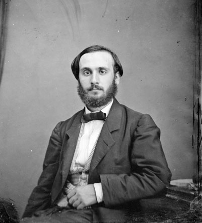 Fonds Trutat - Photographie ancienne Cote : TRU C 1162 Localisation : Fonds ancien (S 30) Original non communicable Titre : Eugène Trutat Auteur : Trutat, Eugène Rôle de l’auteur : Photographe Date de création : 1859-1910 [entre] Mesures : : 7,5 x 7 cm Mot(s)-clé(s) : -- Homme -- Costume masculin -- Portrait -- Table -- Assis -- Mi-corps (à) -- Face (de) -- Trutat, Eugène -- 19e siècle, 2e moitié -- 20e siècle, 1e quart Médium : Photographies -- Négatifs sur plaque de verre -- Noir et blanc -- Portraits Bibliothèque de Toulouse. Domaine public